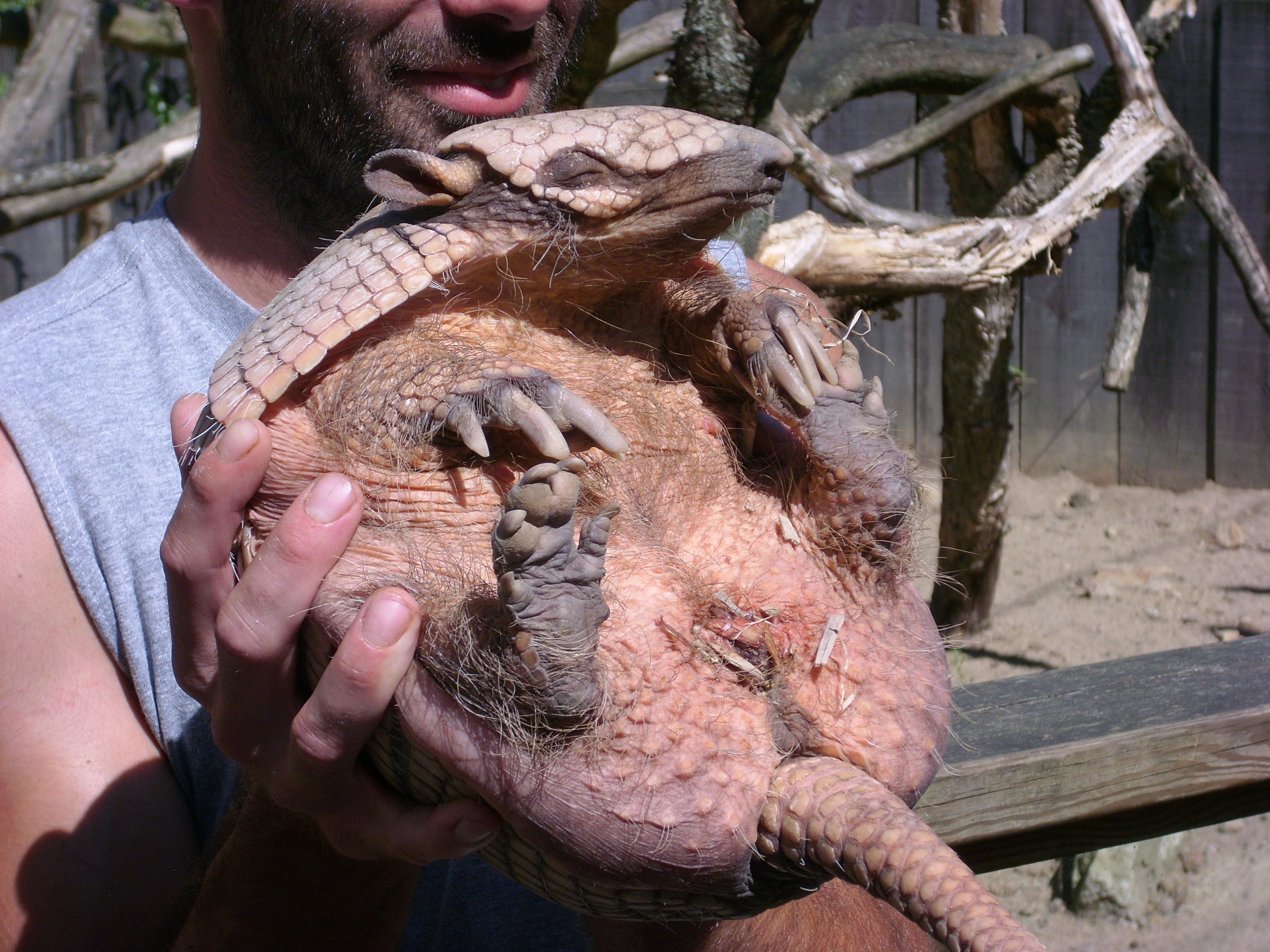 Tatou laissant afficher son ventre.